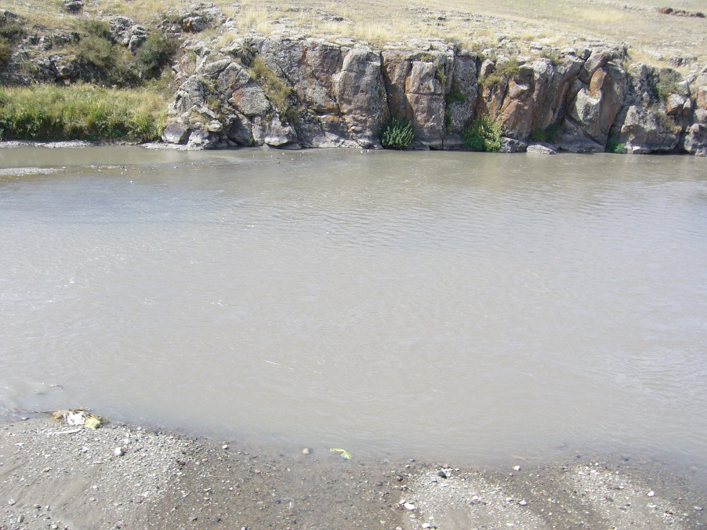 Rivière en Arménie